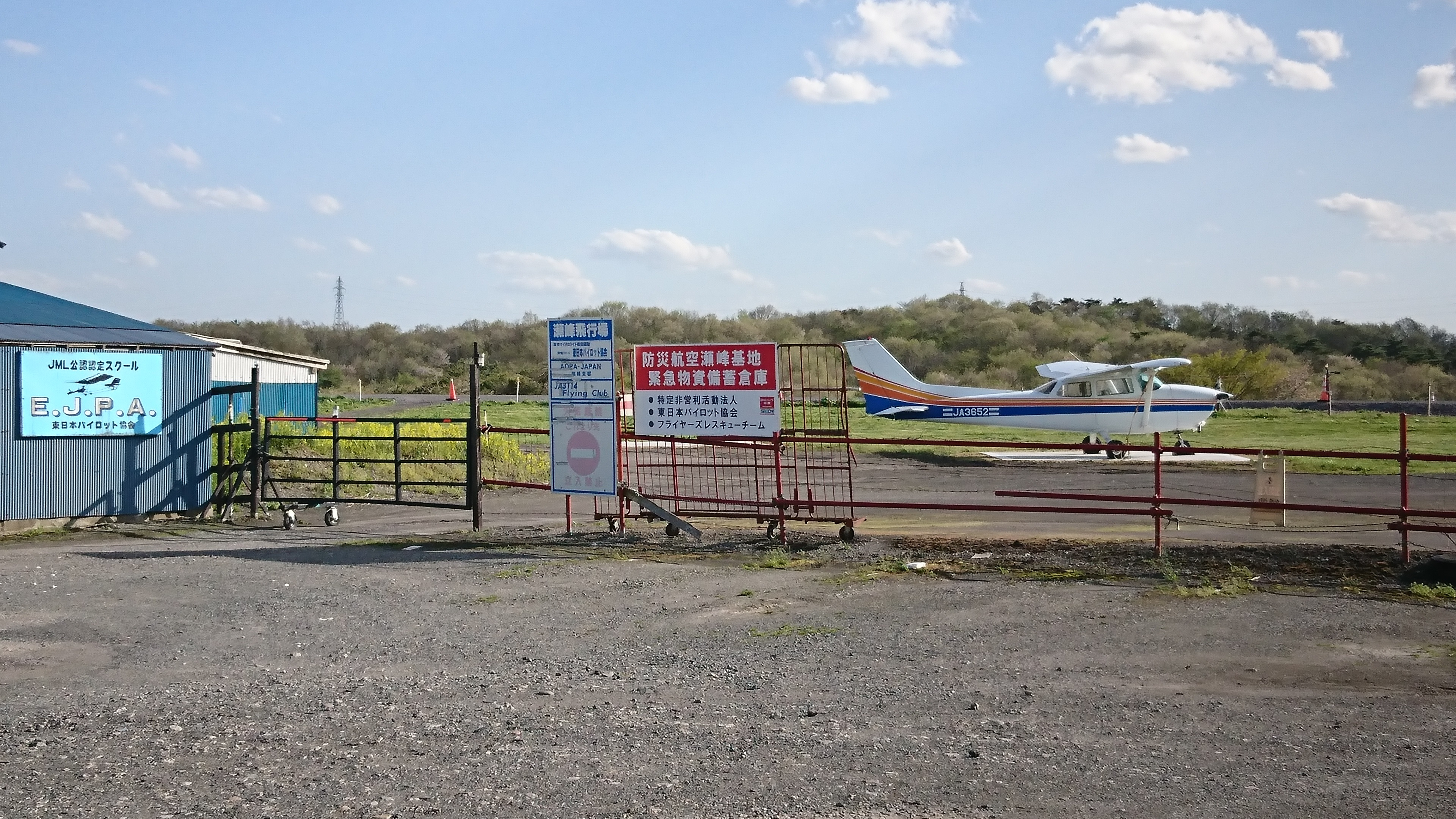 瀬峰飛行場